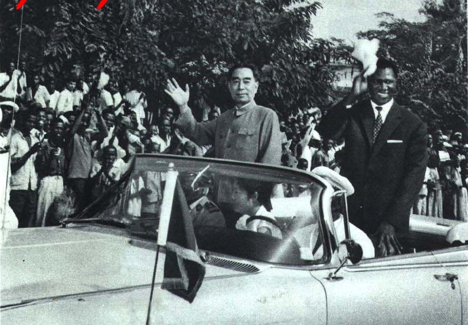 1964-04 1964年1月21日 中国访问几内亚 周恩来与杜尔总统